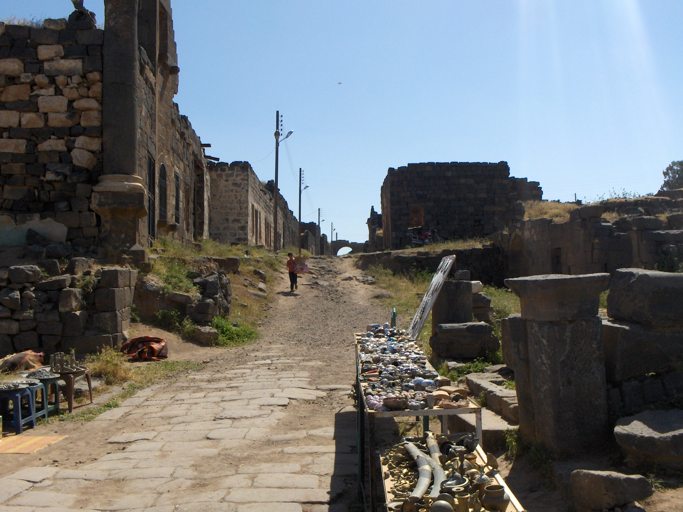 Una via di Bosra, Siria